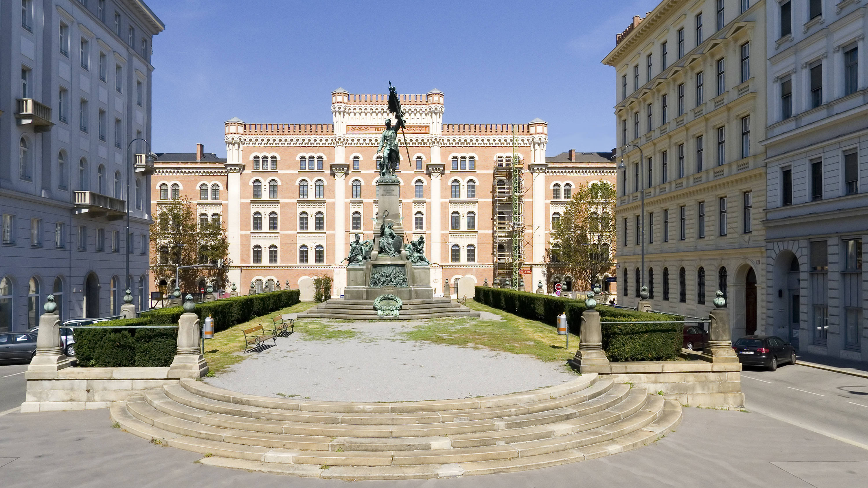 Deutschmeisterplatz in Wien 1 beim Schottenring Richtung Nordwesten